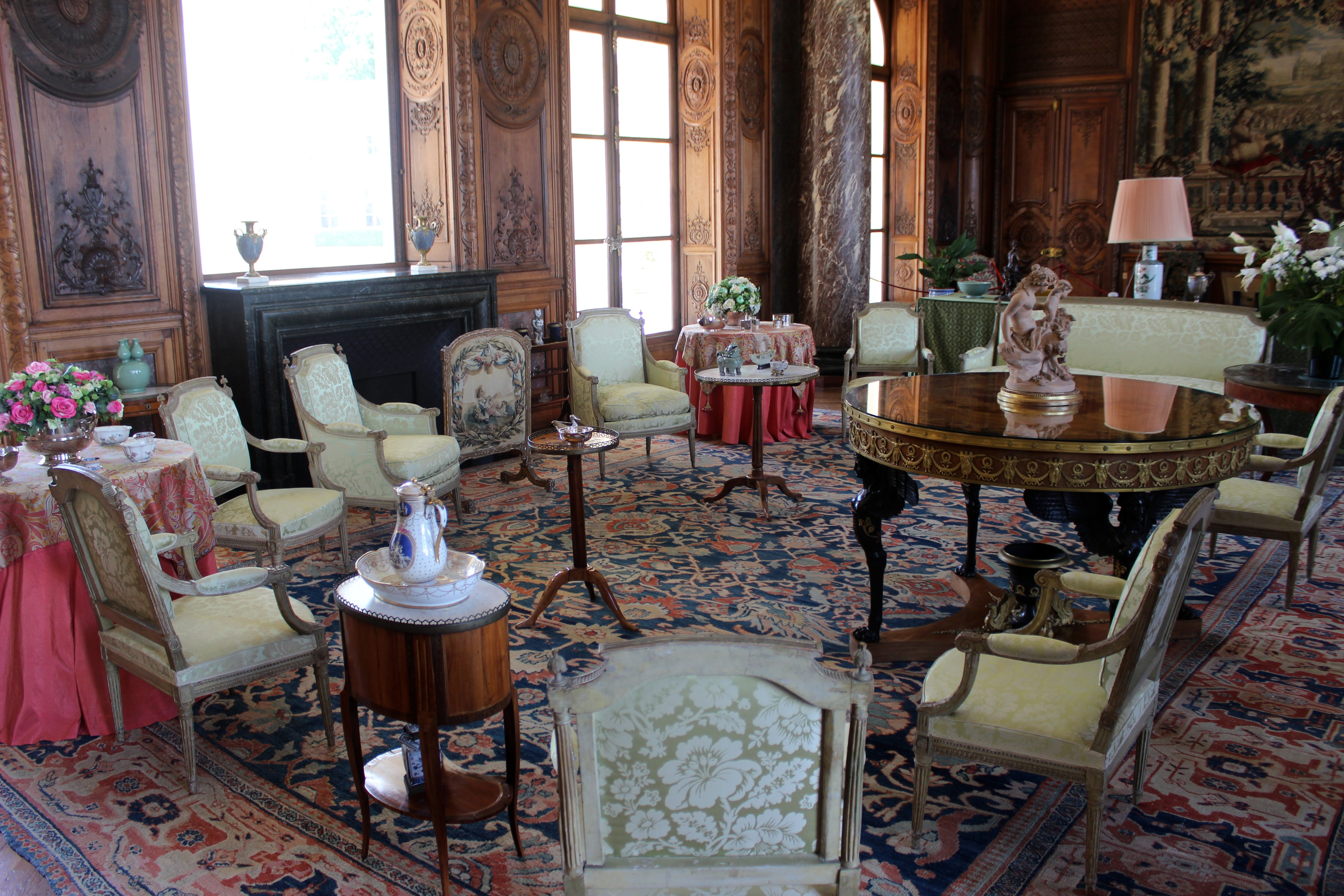 Vernon. Château de Bizy. Salón.